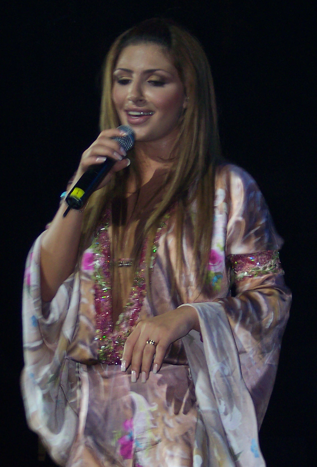 Elena Paparizou performing in Chicago, Illinois.